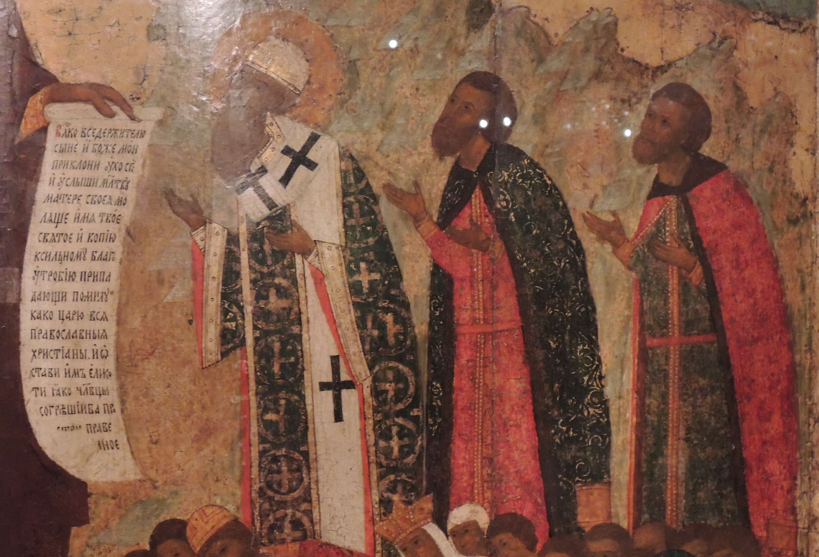 "Богоматерь Боголюбская с предстоящими". Москва, 1-я треть 16 века. Музеи Московского Кремля. Икона представляет собой особый вариант древнего образа Богоматери Боголюбской 12 века, называющийся "Моление о народе" или "Богоматерь Молебная". Коленопреклоненные представители разных сословий, символизирующие население православного царства, возглавляемые митрополитом Ионой и князьями Василием Темным и его сыном Иваном III просят Богоматерь о заступничестве.